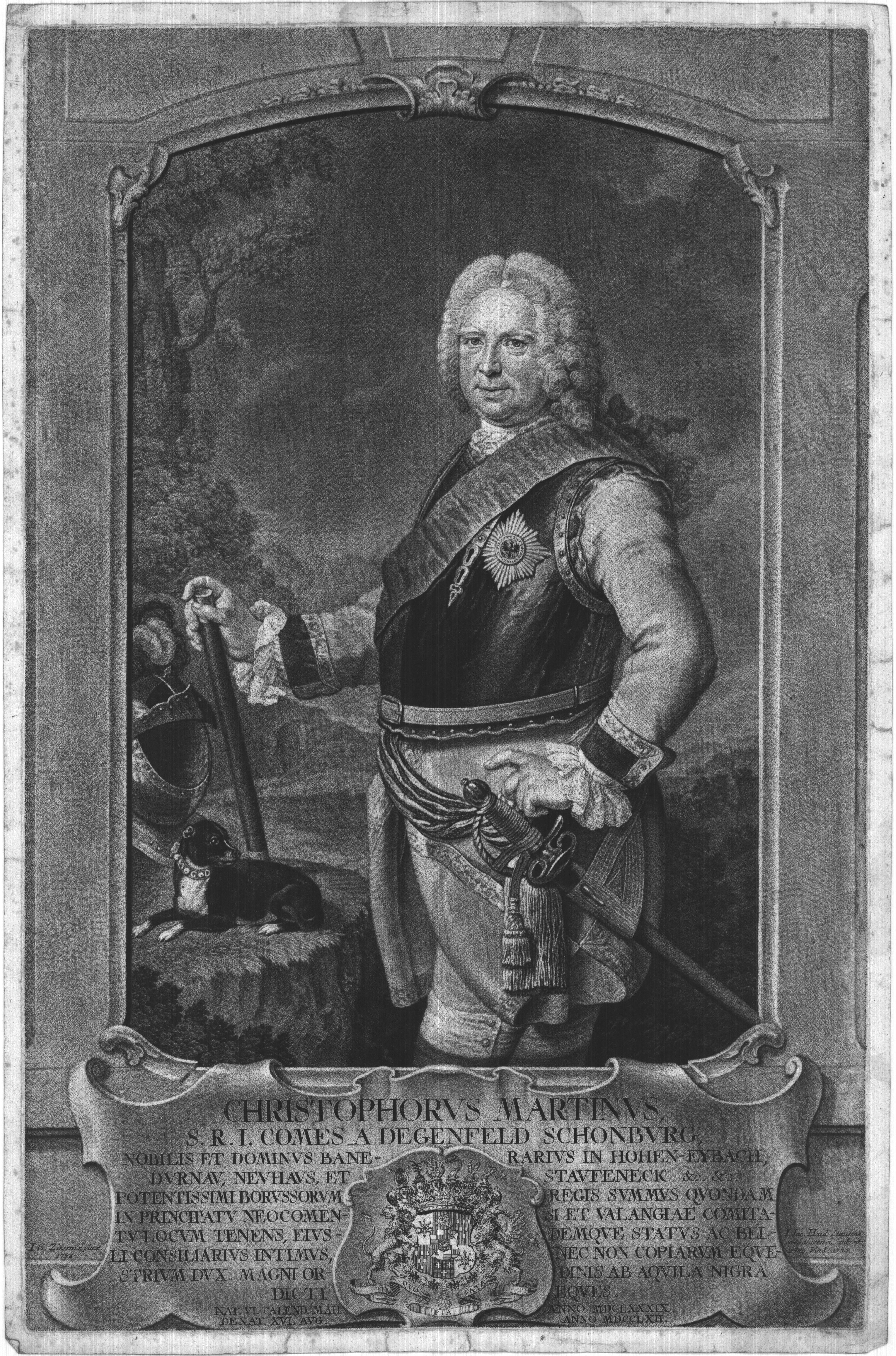 Christoph Martin von Degenfeld-Schonburg,(* 16. April 1689 in der Pfalz; † 16. August 1762 in Frankfurt am Main) war königlich preußischer General, Gesandter sowie wirklicher Staats- und Kriegs-Minister